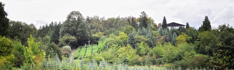 Vorgebirgshang Grünes C